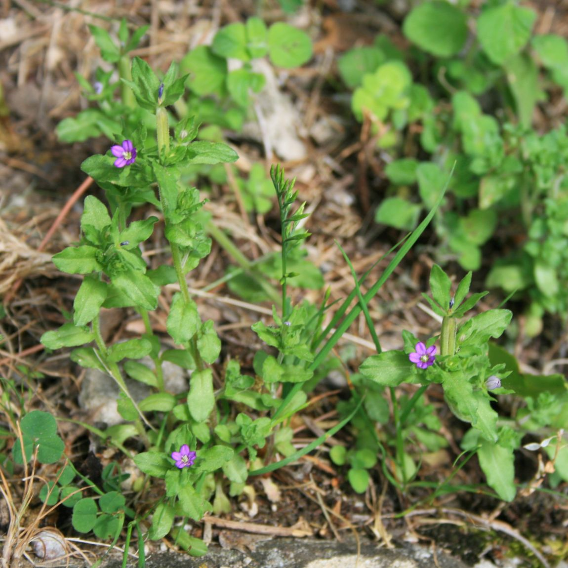 Legousia hybrida, Glockenblumengewächse (Campanulaceae) - Italien/Italia/Italy: Emilia-Romagna, Prov. Reggio nell'Emilia, Castello di Canossa